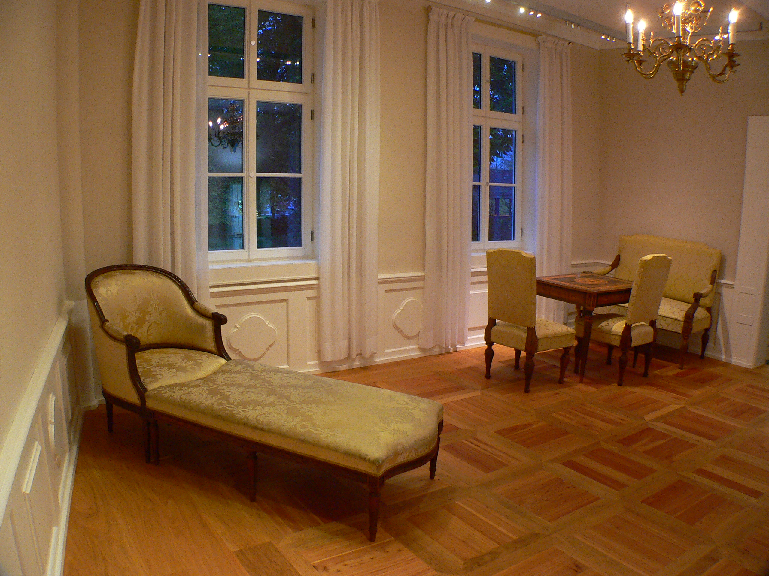 Palais Papius in Wetzlar, Deutschland, Hessen. Museum für Möbel des 17. bis 18. Jahrhunderts. Ausstellungsraum 2.